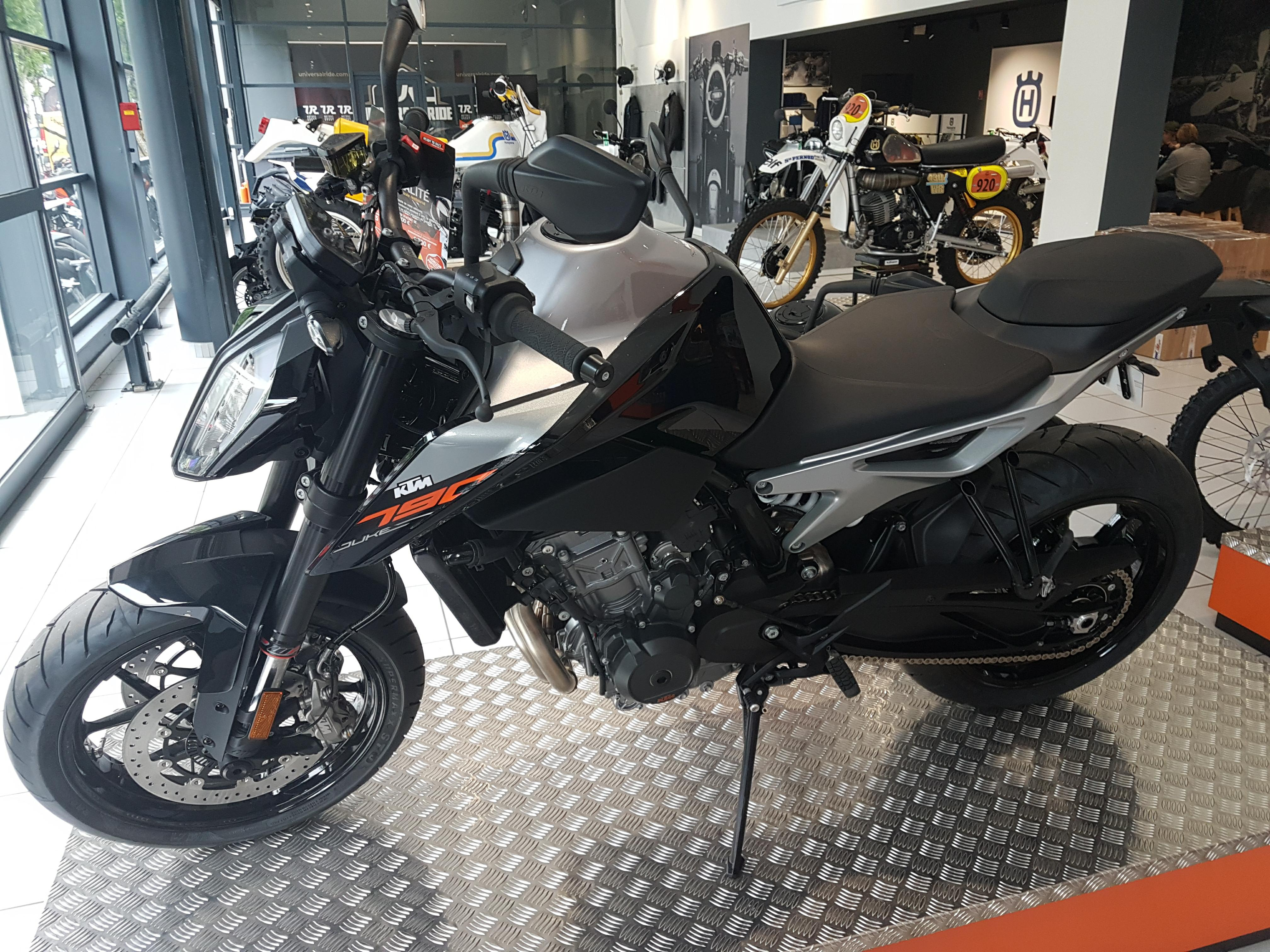 KTM Duke 790 2018